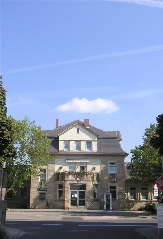 Blick auf den (geschlossenen) Bahnhof in Lampertheim, Hessen